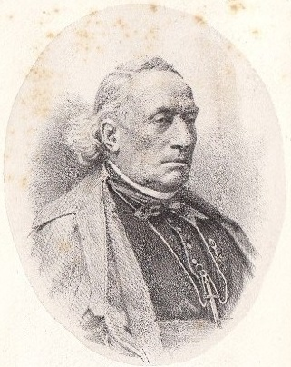 Portrait de Monseigneur Labis, évêque de Tournai.